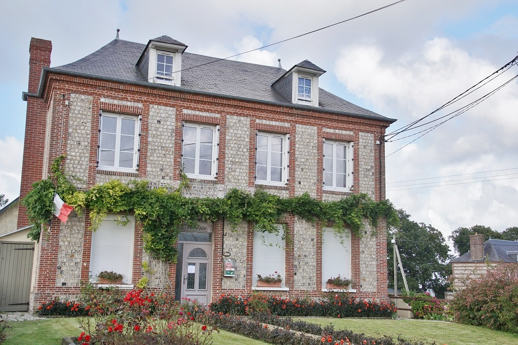 la Mairie